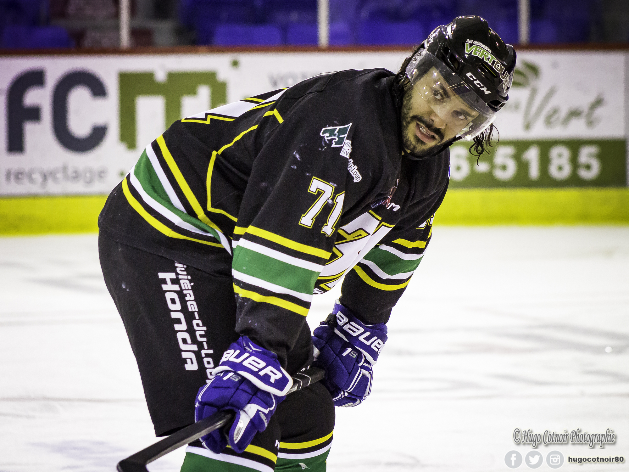 Lors d'un match de la Ligue Nord-Américaine de Hockey (LNAH) à Trois-Rivières.